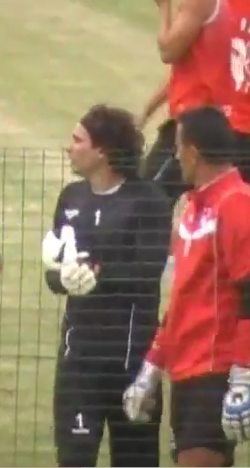 Guillermo Ochoa entrenando con el AC Ajaccio de Francia.